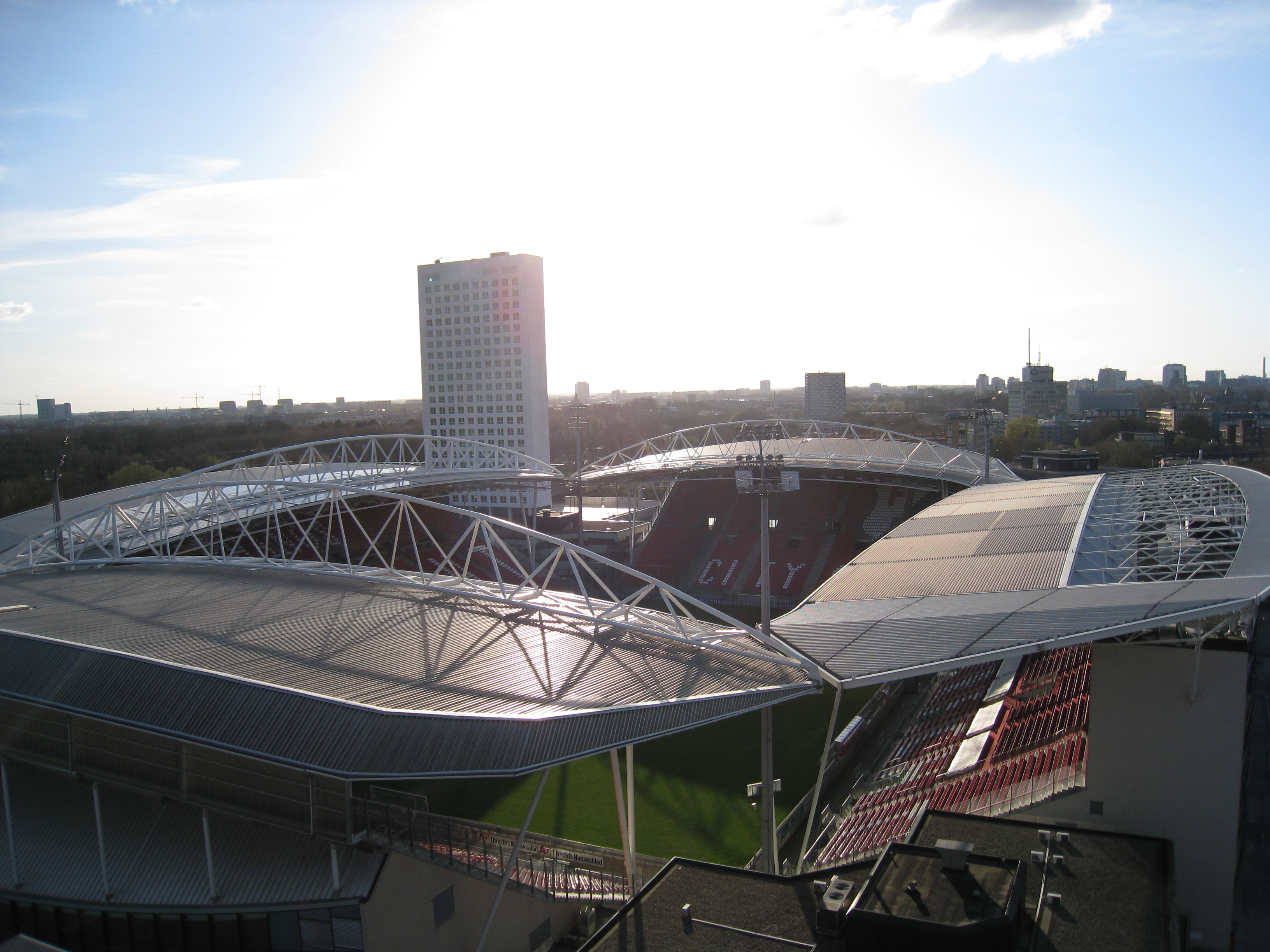 Stadion Galgenwaard van boven